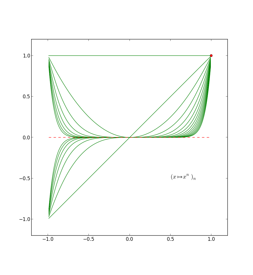 Représentation de la suite de fonctions puissances sur son domaine de convergence simple